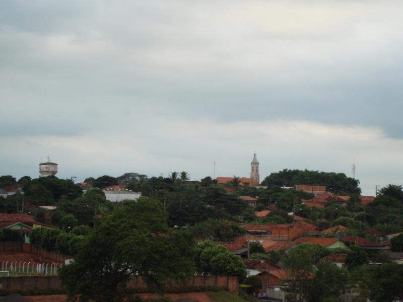 Vista da cidade paulista de Indiana.